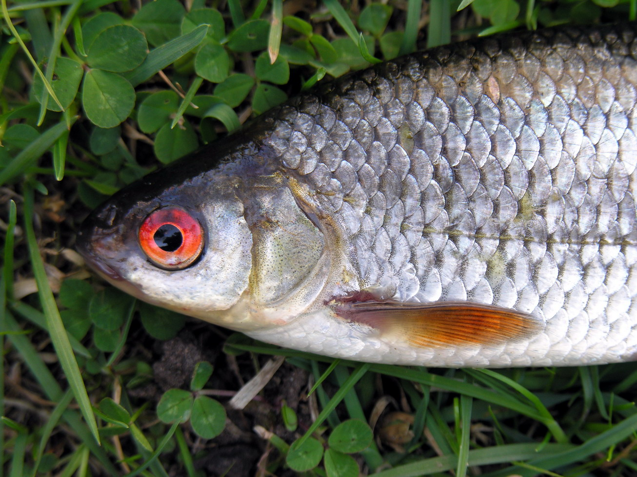 Raudė (Rutilus rutilus) Šeima. Karpinės (Cyprinidae) Fotografavo: Algirdas, 2006 m. gegužės 8 d.